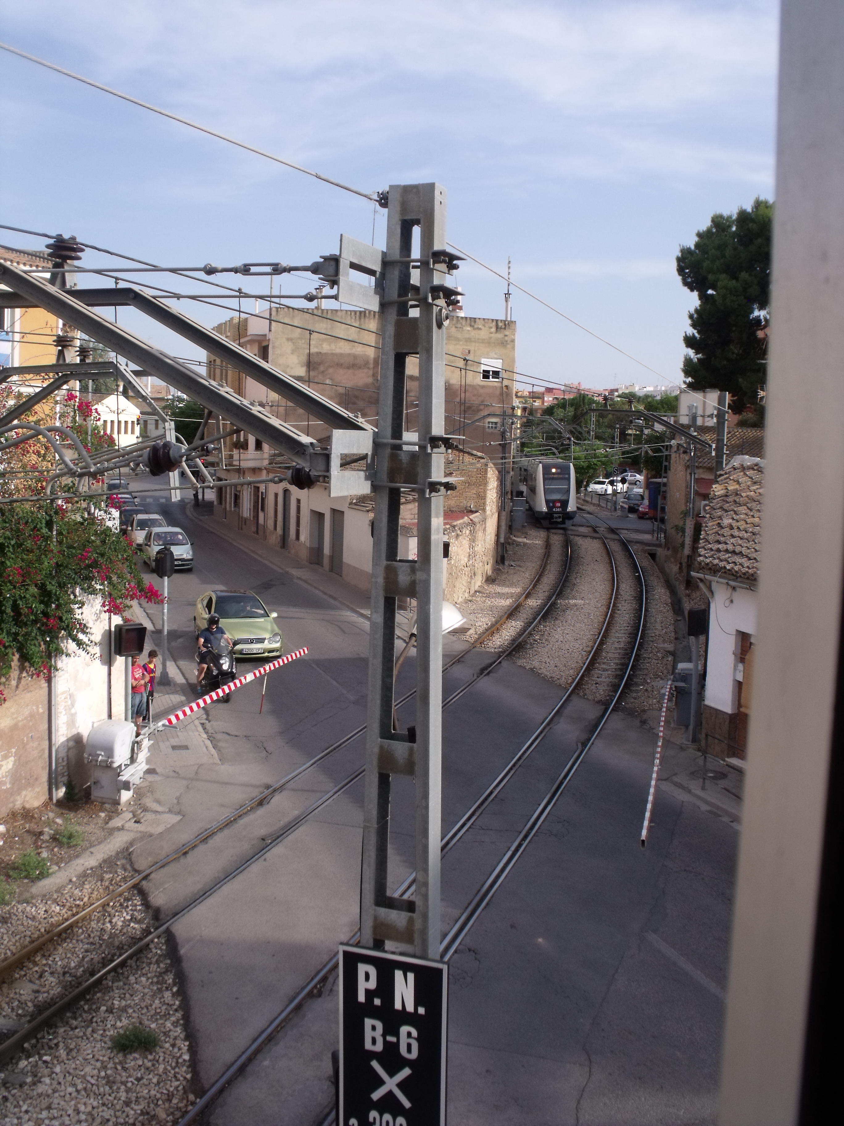 Torre de control de ferrocarril. Godella (Valencia). Se construyó para controlar estos dos pasos a nivel, el más cercano es el de la carretera de Burjasot a Torres Torres, el más alejado es el de la avenida de Joan Peset. Al fondo se ve la entrada a la estación de Godella.